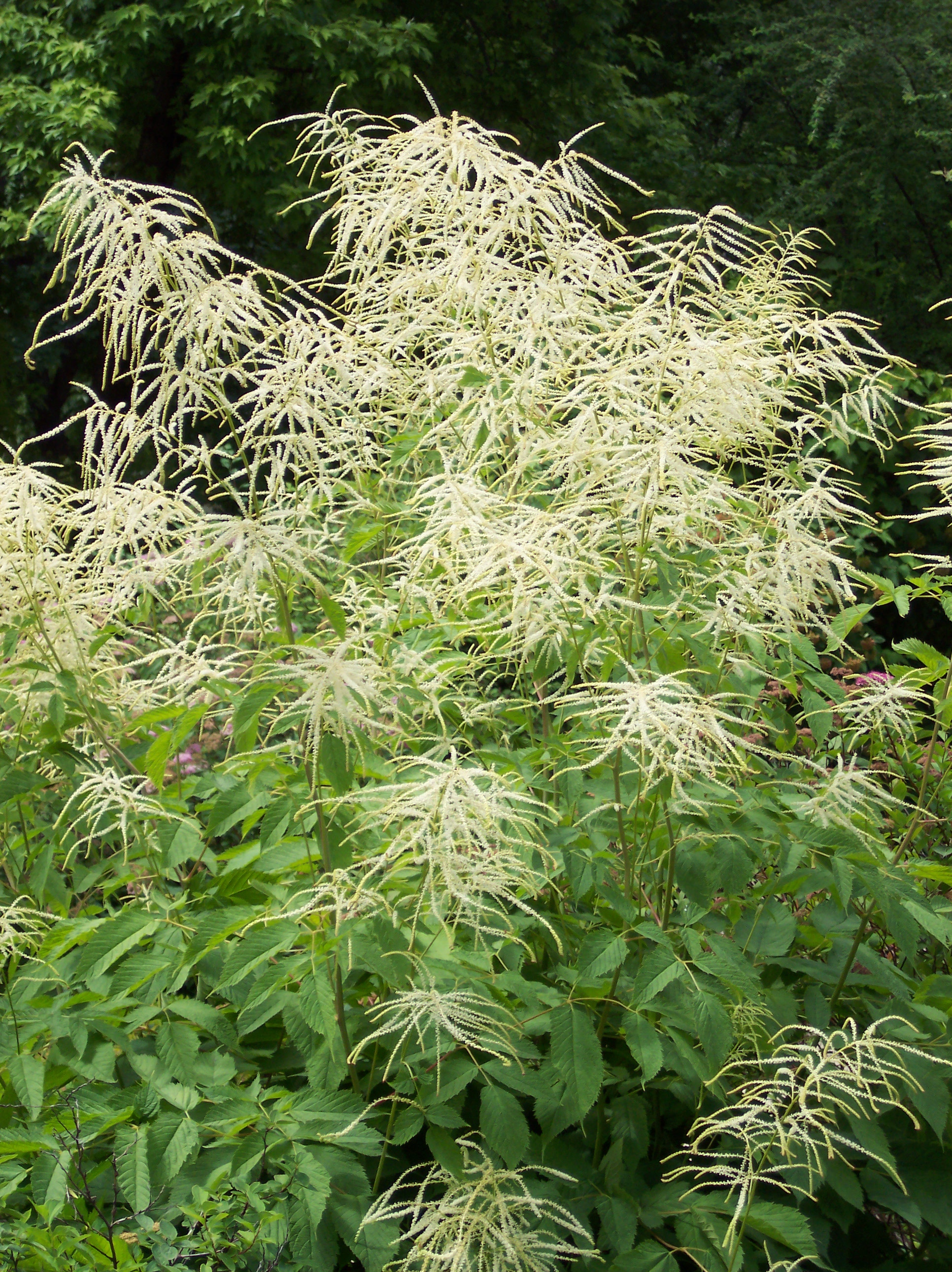 Aruncus dioicus. Real Jardín Botánico, Madrid.